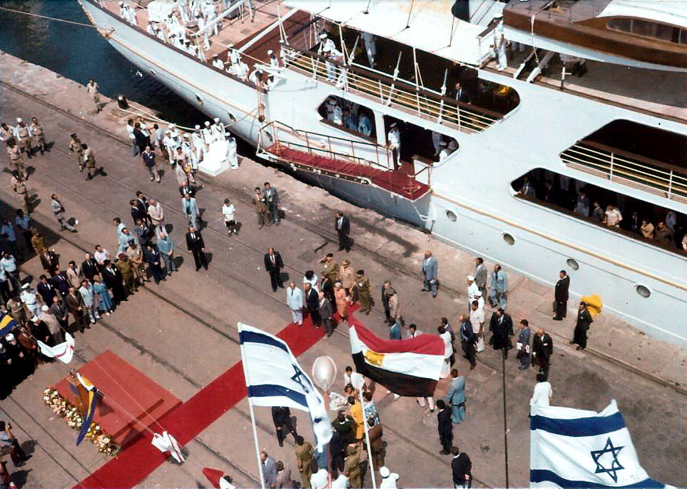 הנשיא סאדאת מבקר בישראל השטיח האדום בנמל חיפה